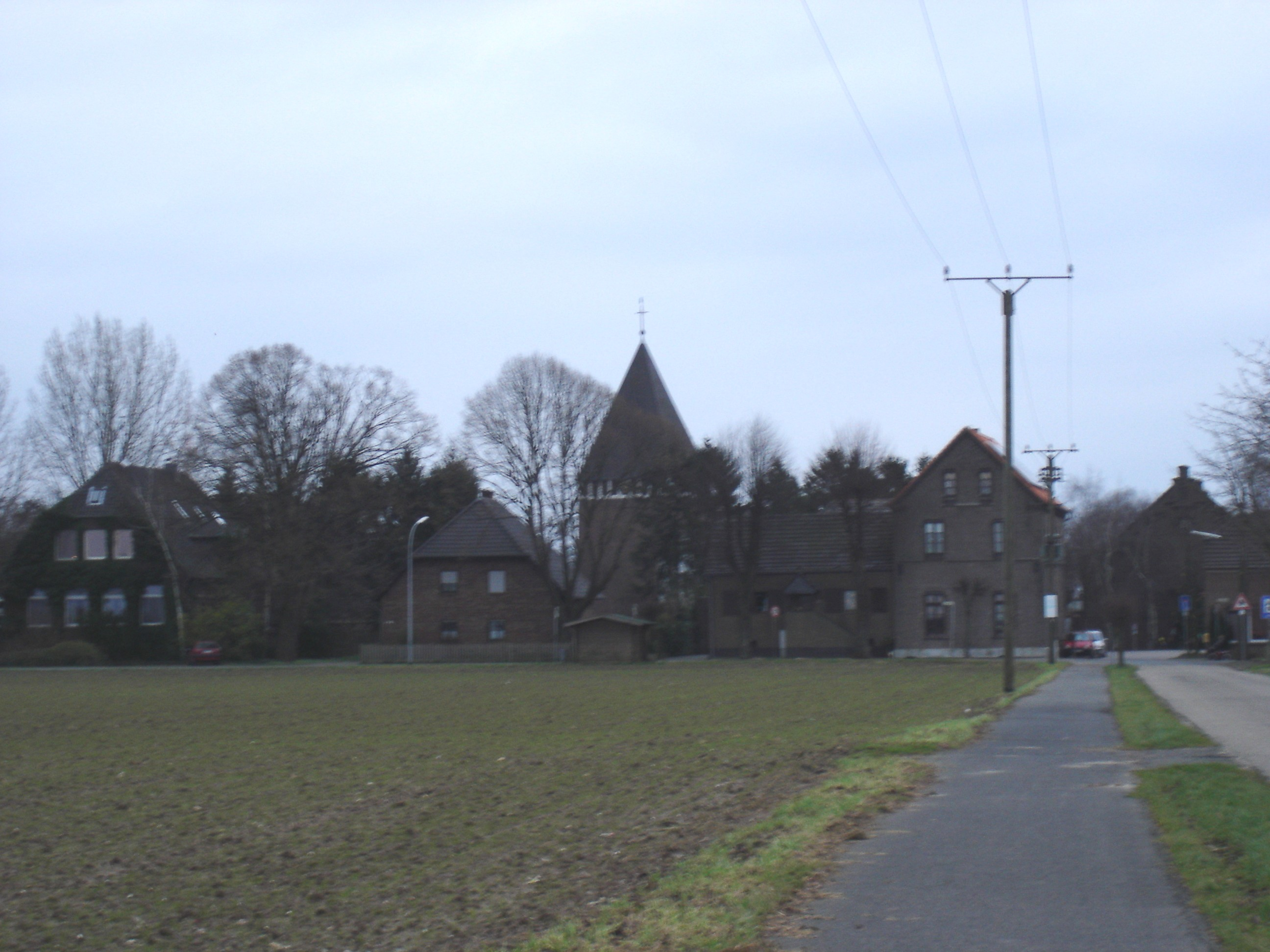 Obermörmter bei Xanten selbst fotografiert von Benutzer:Xantener am 5. Jan 2005 Lizenz: GFDL